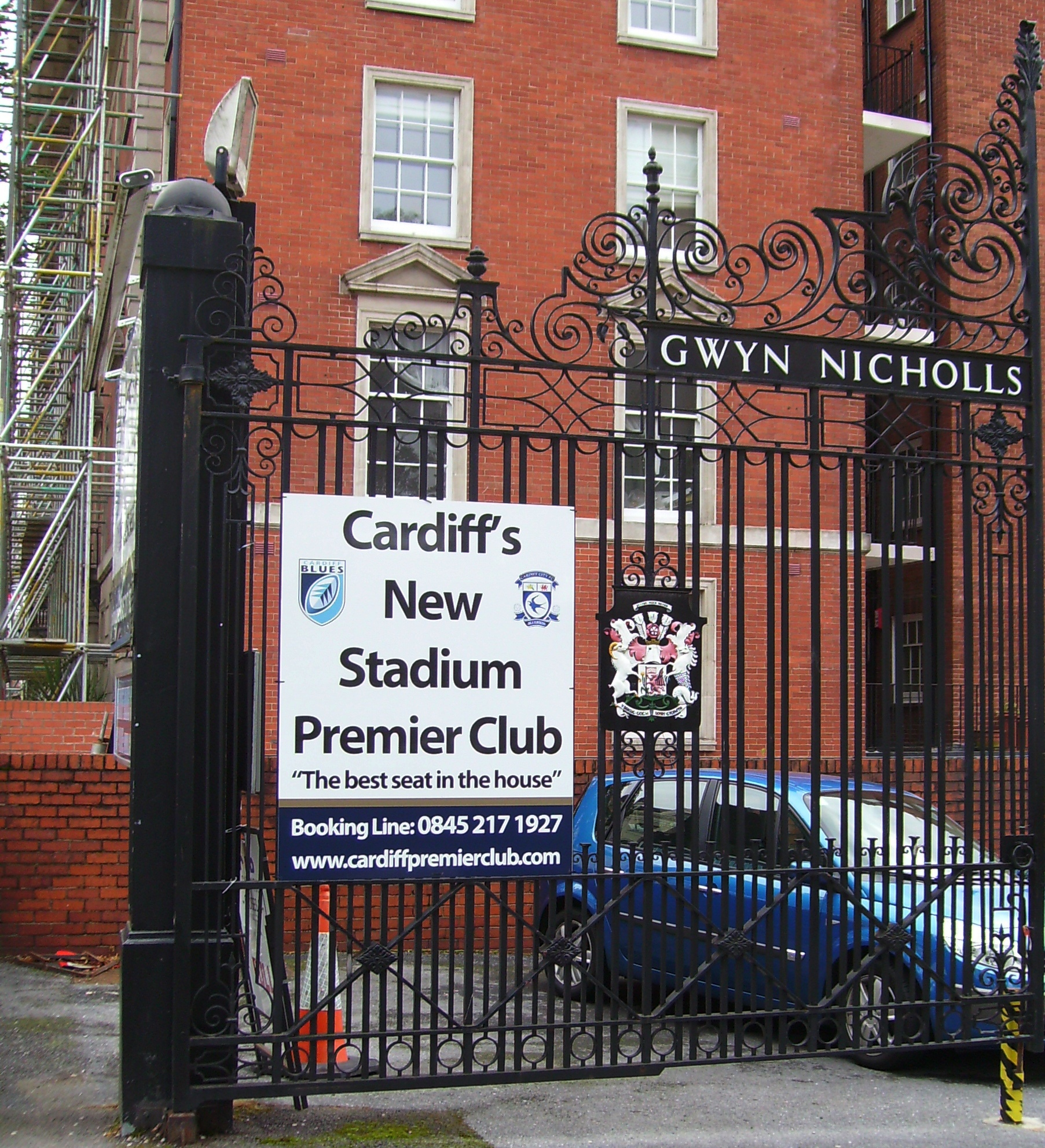 Gwyn Nicholls Memorial Gates (left), Cardiff Arms Park, Cardiff Wales